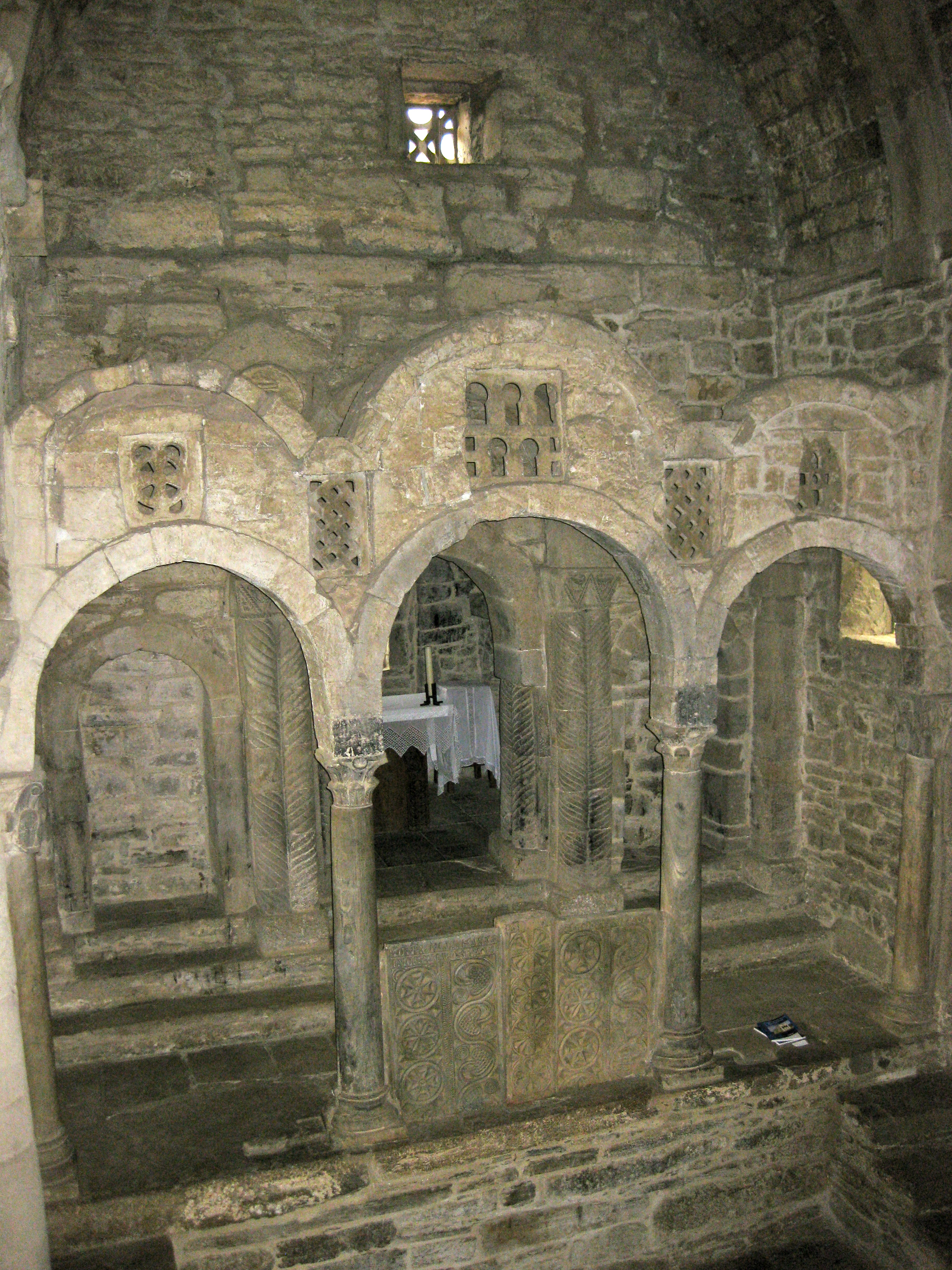 Vista de la zona del altar de Santa Cristina de Lena